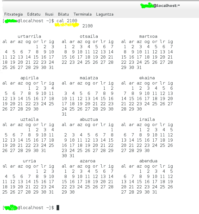 Linux terminal batean 'cal 2100' komandoa idatzita, 2100. urteko egutegia ikusten da